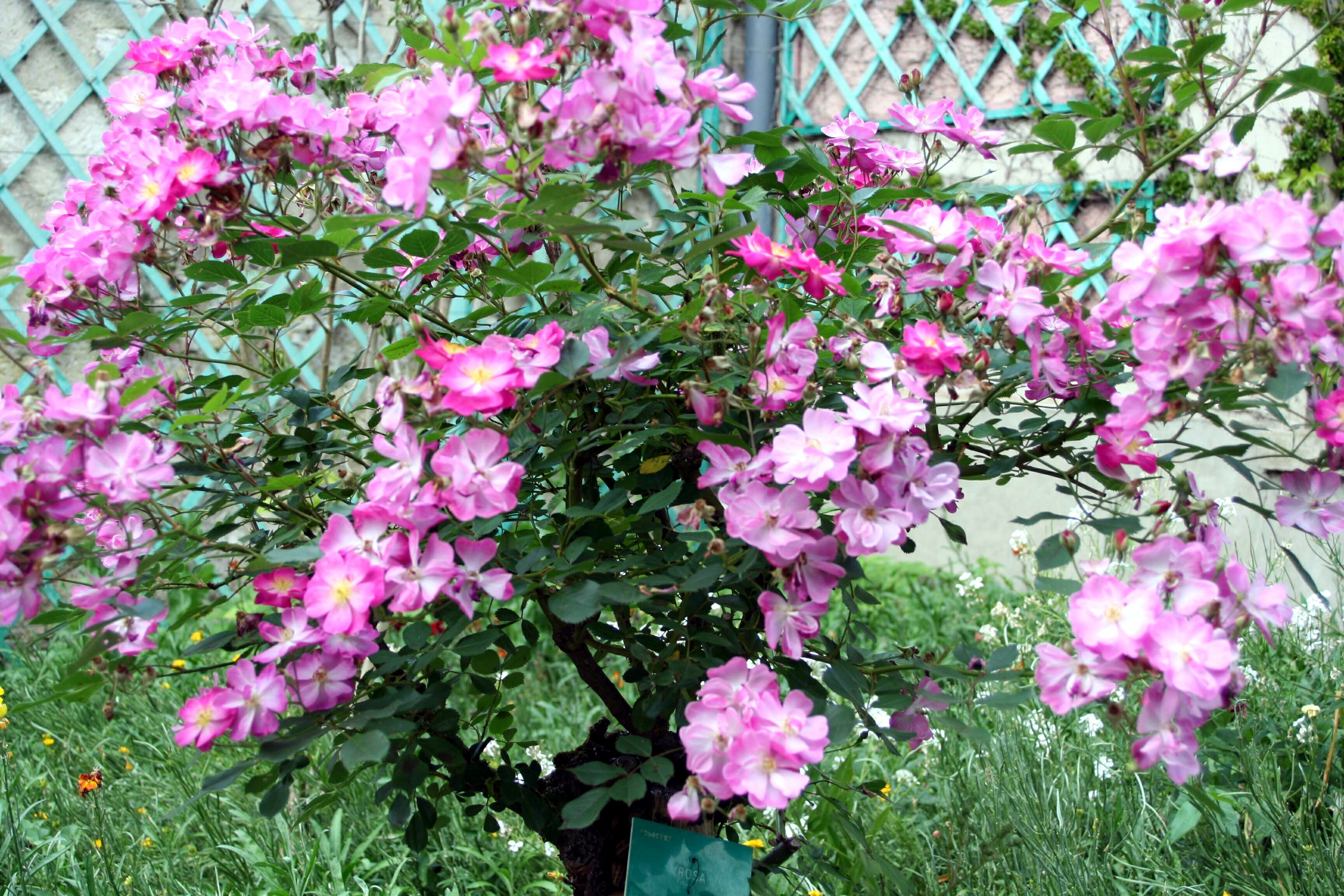 Rose 'Lavender Dream' photographiée dans le jardin de Claude Monet à Giverny - Eure (France)